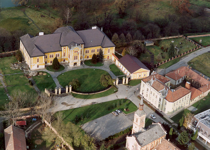 Palace - Szécsény - Hungary - Europe